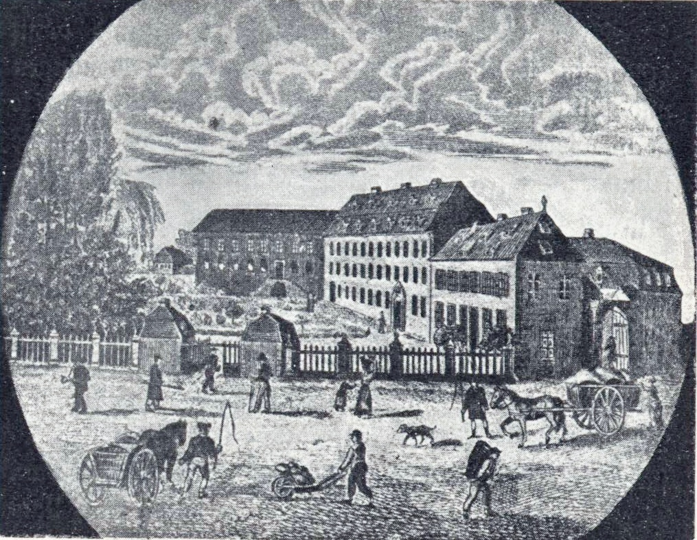 Grünstadt (Pfalz), Schloss Unterhof der Grafen von Leiningen